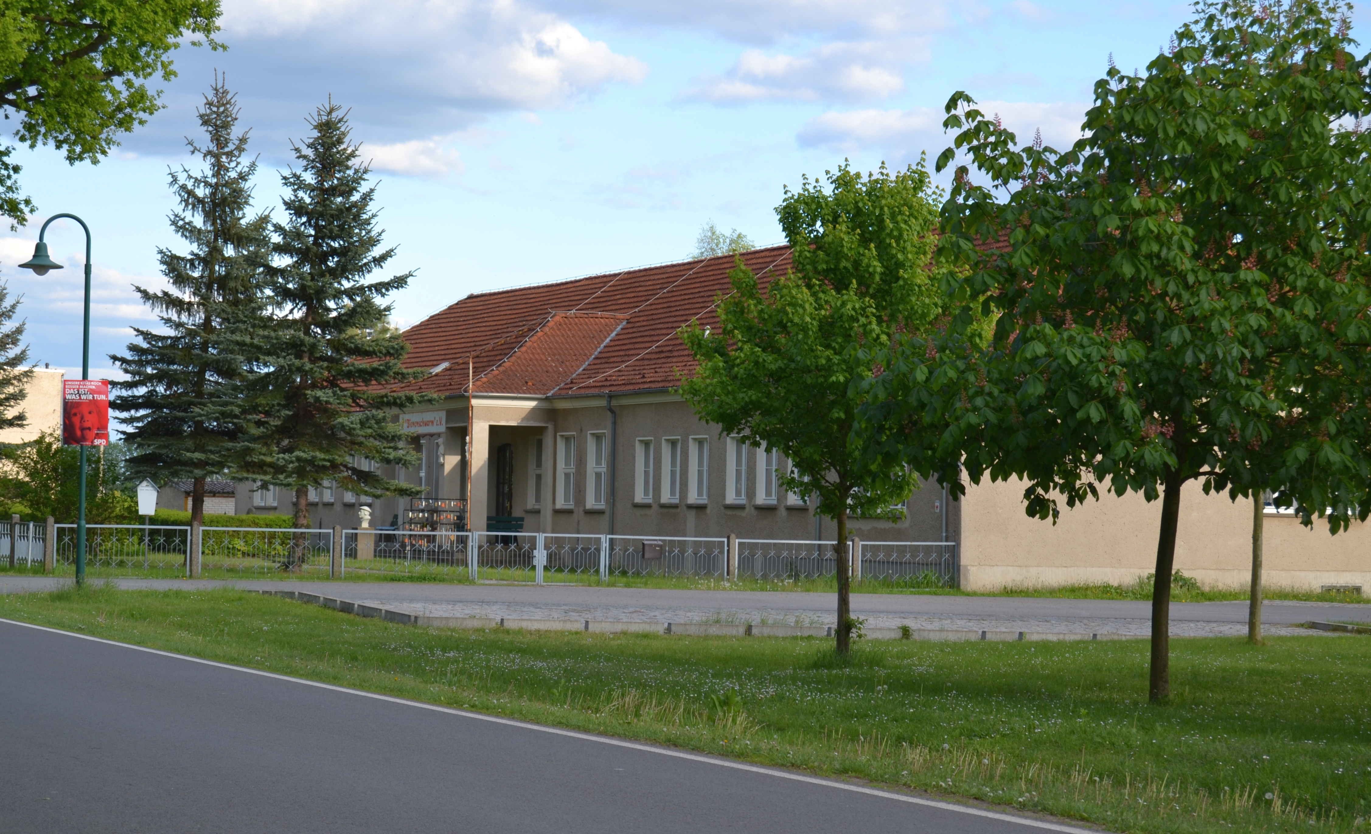 Fotoprojekt – Zwischen Berlin und Oder 2014 Photo project “Between Berlin and River Oder 2014” Baudenkmal Grundschule, Ortwig, Gemeinde Letschin.